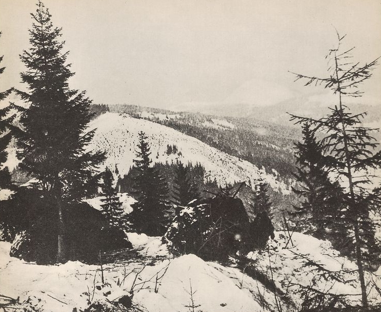 Ziemianki Legionów Polskich pod Kirlibabą